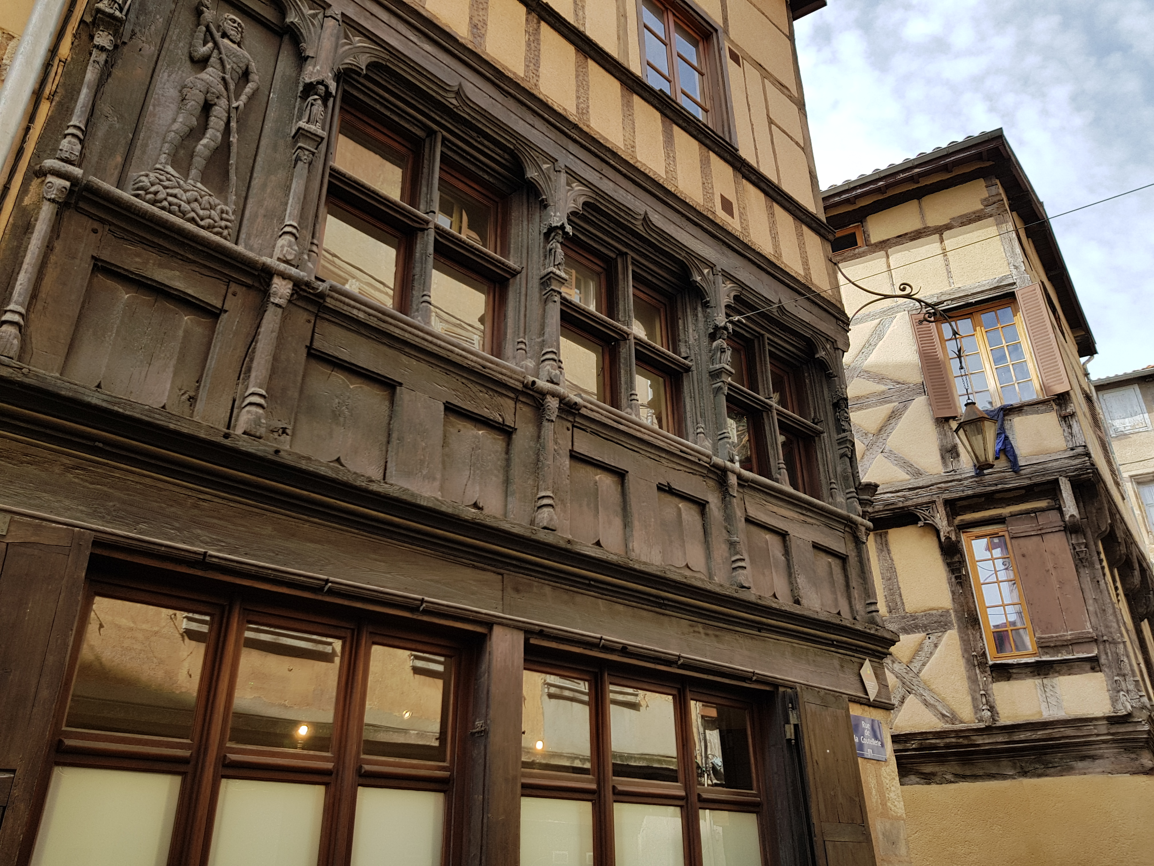 Maison de l'Homme des bois accueillant le Musée de la Coutellerie à Thiers